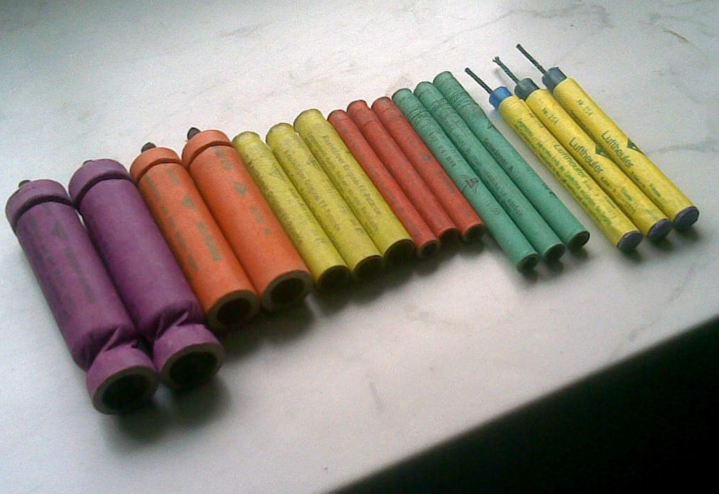 Knaller und Kanonenschläge deutscher Fertigung. Wird alles nicht mehr hergestellt